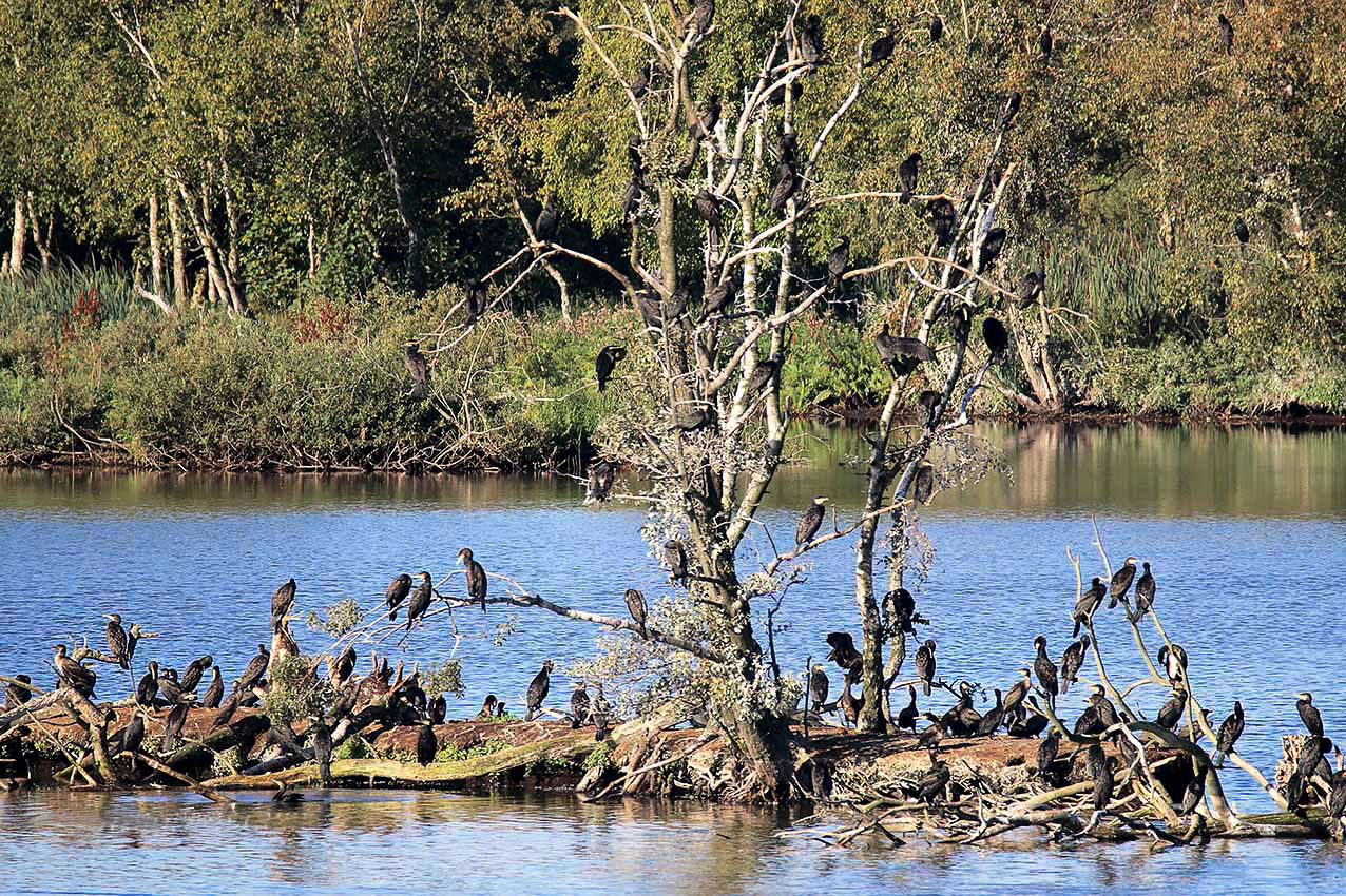 Kormorankolonie am Nordende des Plauer Sees